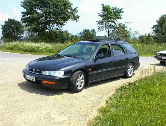 Honda Accord Aerodeck (1993-1997 Typ CE2)